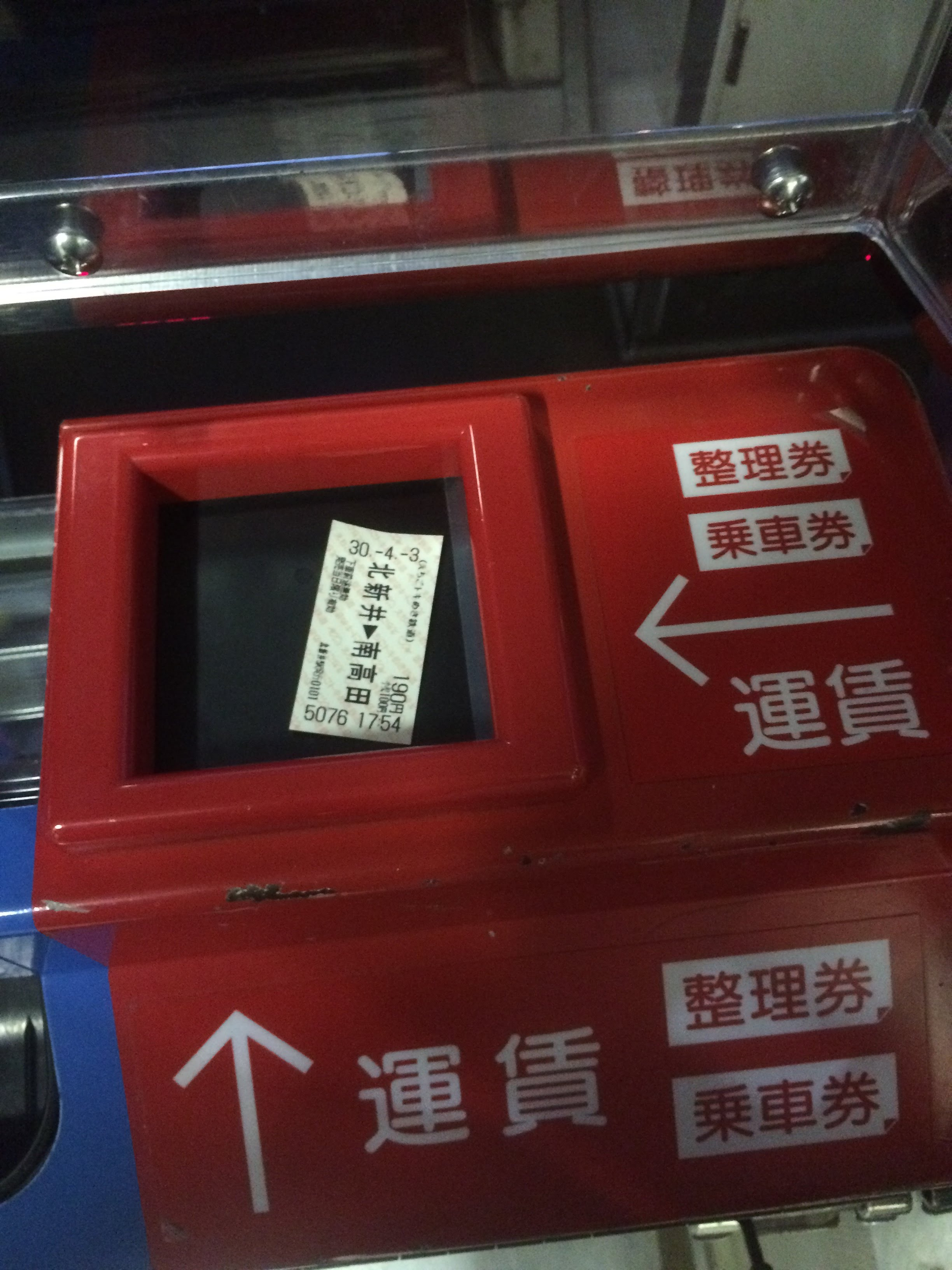 ETR妙高はねうまラインを走るET127系の運賃箱に置かれた切符